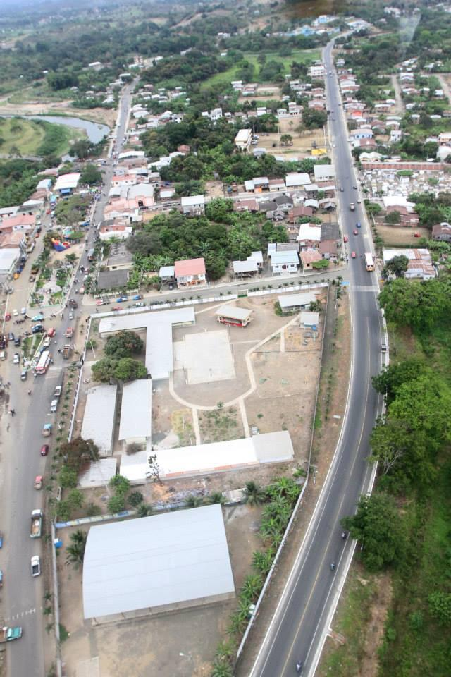 Vista panorámica tomada El día 10 de Agosto de 2013